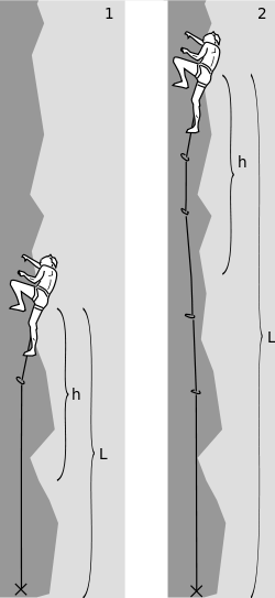 Diagrama sobre el Factor de caída